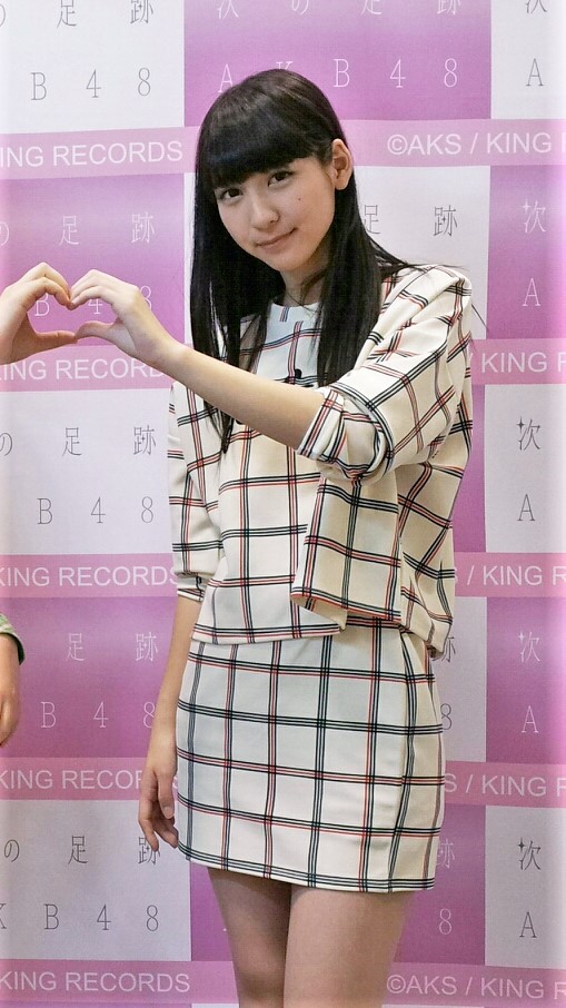 (20140503) 次の足跡 샤메회 in 오사카 (Jurina Matsui)